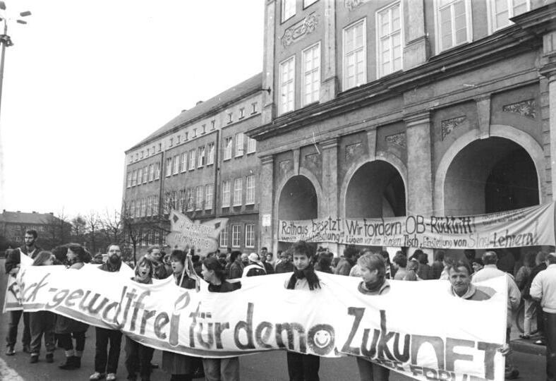 ADN-Sindermann 26-3-90 Rostock- Rathausbesetzung- Vertreter des Runden Tisches und des Bürgerrates der Stadt forderten mit dieser Aktion den Rücktritt des Oberbürgermeisters Dr. Henning Schleiff wegen Amtsmißbrauch und widerrechtlichen Vertragsabschlüssen mit westdeutschen Firmen. Am Nachmittag gab Schleiff den massiven Rücktrittsforderungen nach und legte sein Amt nieder.